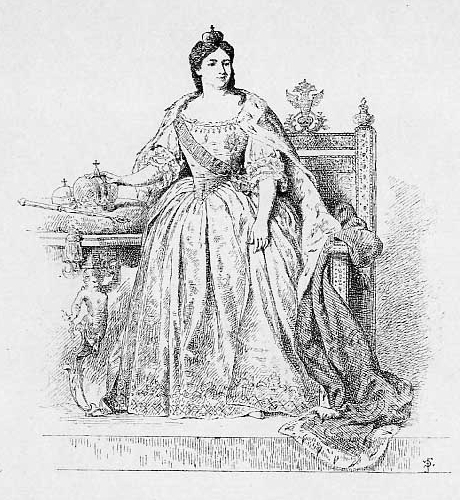 Императрийца Анна Иоановна. 1730-1740 г. Дочь Иоанна Алексеевича, Анна Иоанновна, свое стремление к полезной деятельности заявила уничтожением учрежденного Екатериной I Верховного Совета, основанием в Петербурге Кадетского корпуса и заботами о войске. Но с другой стороны, её царствование ознаменовалось возвышением иноземной партии и соединено с страшным воспоминанием о Бироновщине.